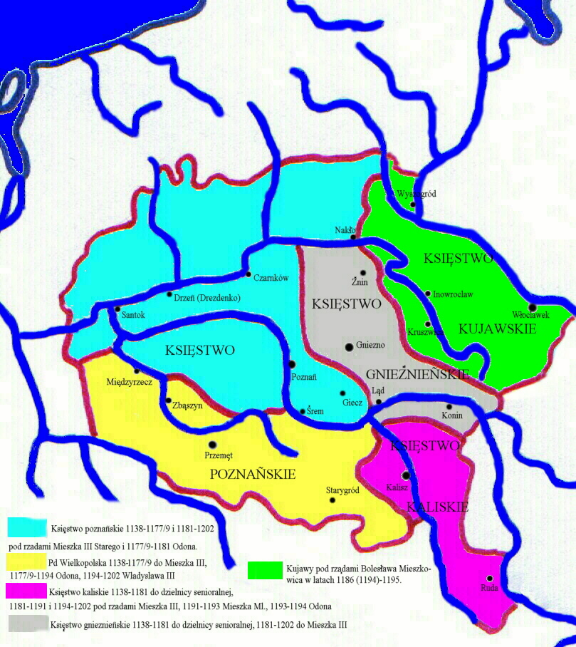 Mapa polityczna Wielkopolski w latach 1138 - 1202. Autor : Zuber